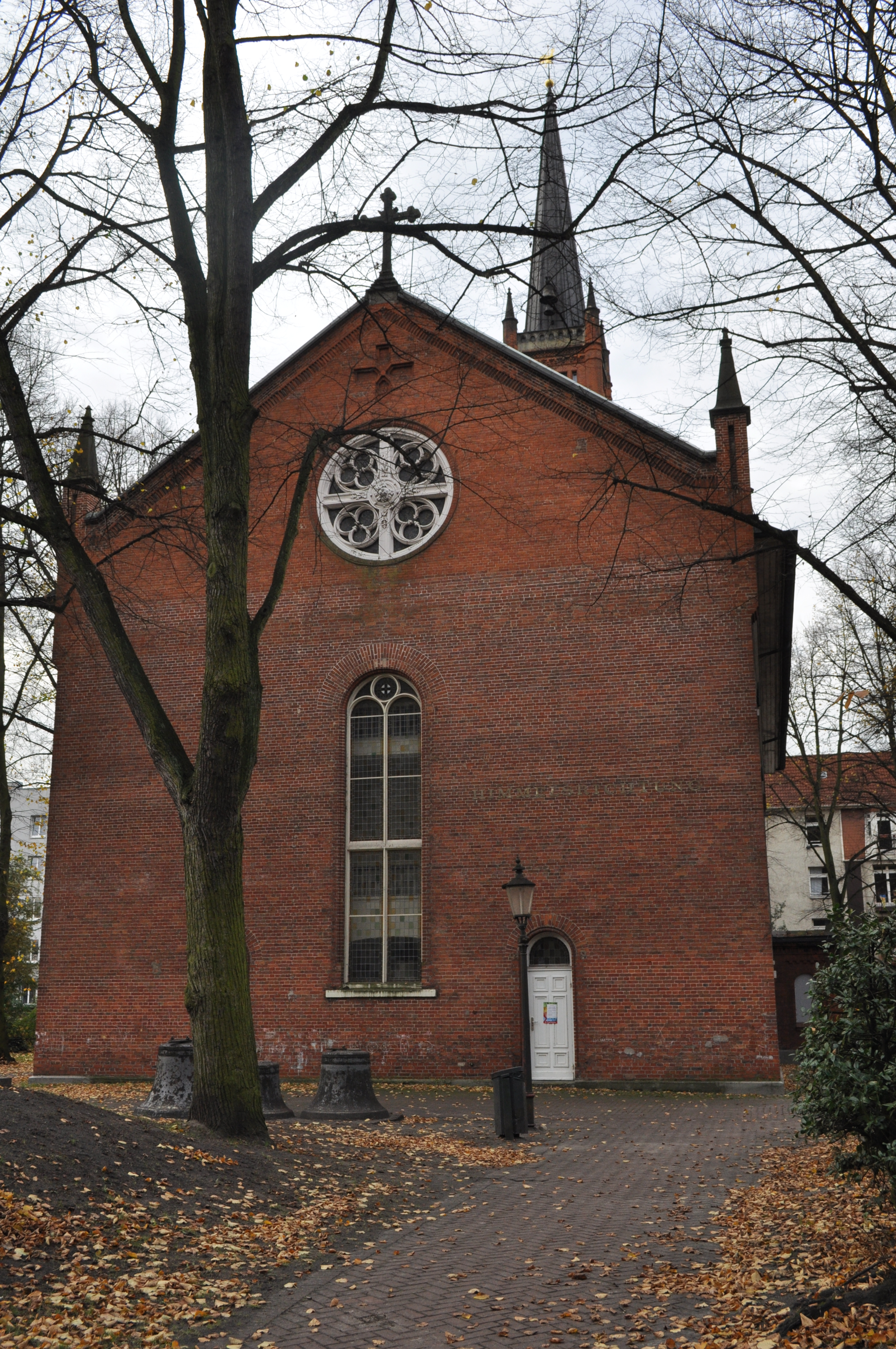 Ostfassade der St.-Pauli-Kirche in Hamburg-Altona-Altstadt. This is a photograph of an architectural monument.